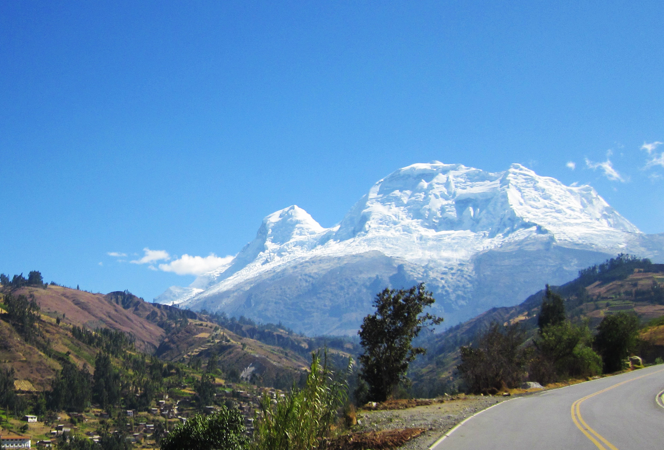 Nevado Huascarán visto desde la carretera Carhuaz - Chacas (sector Shilla)